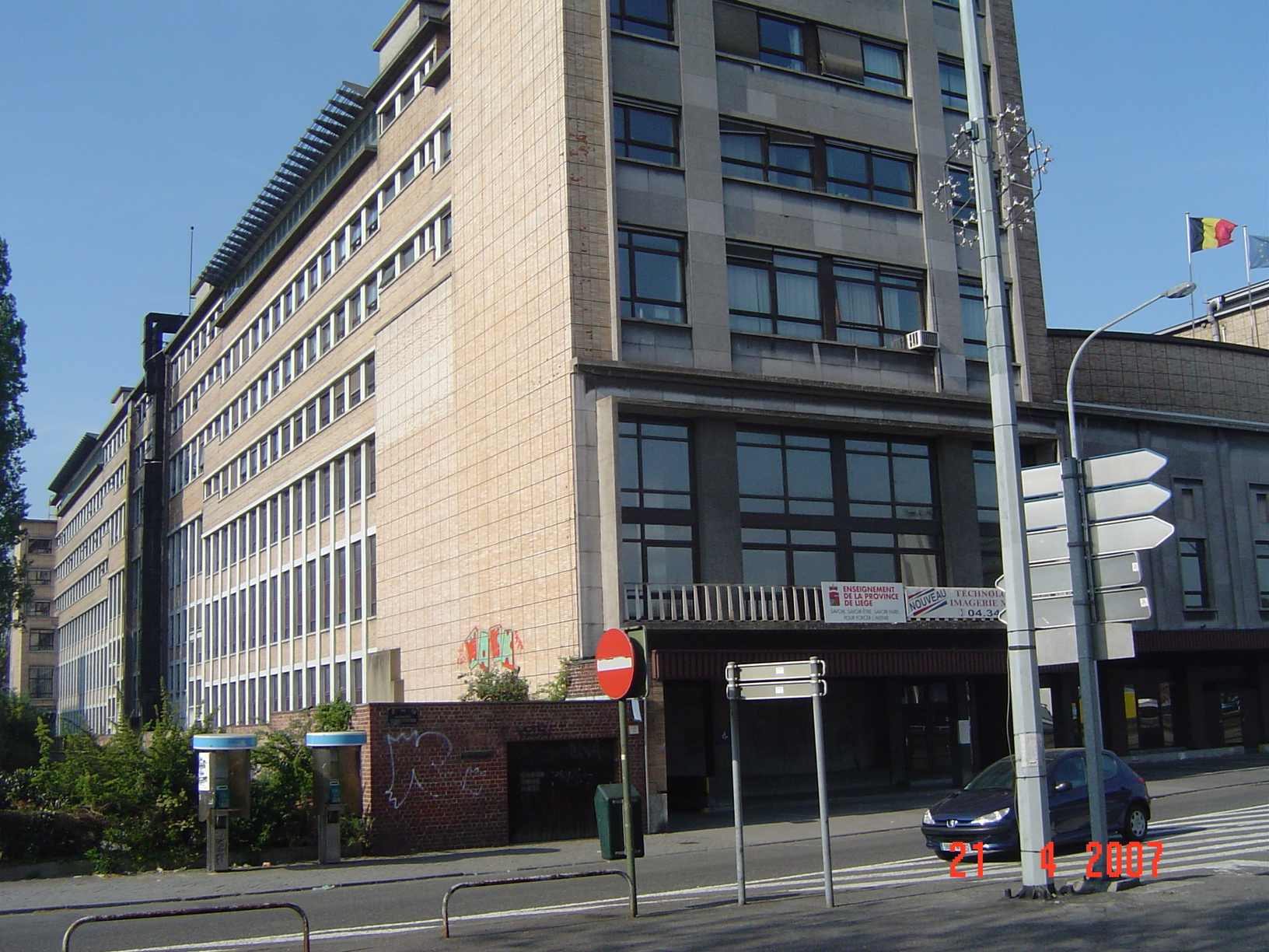 Haute Ecole de la Province de Liège - André Vésale - Implantation de Liège